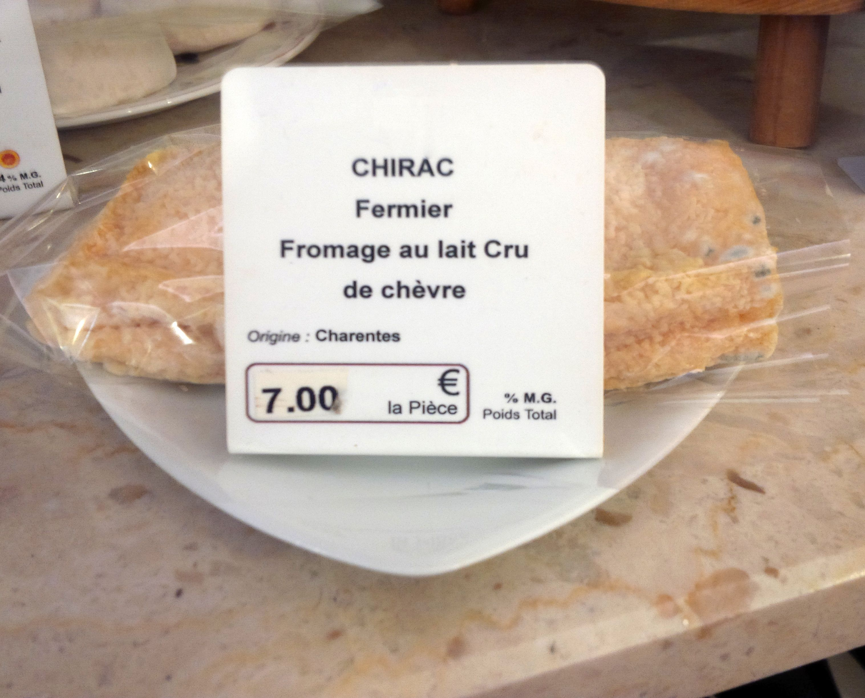 Fromage de chèvre de Chirac (Charentes).